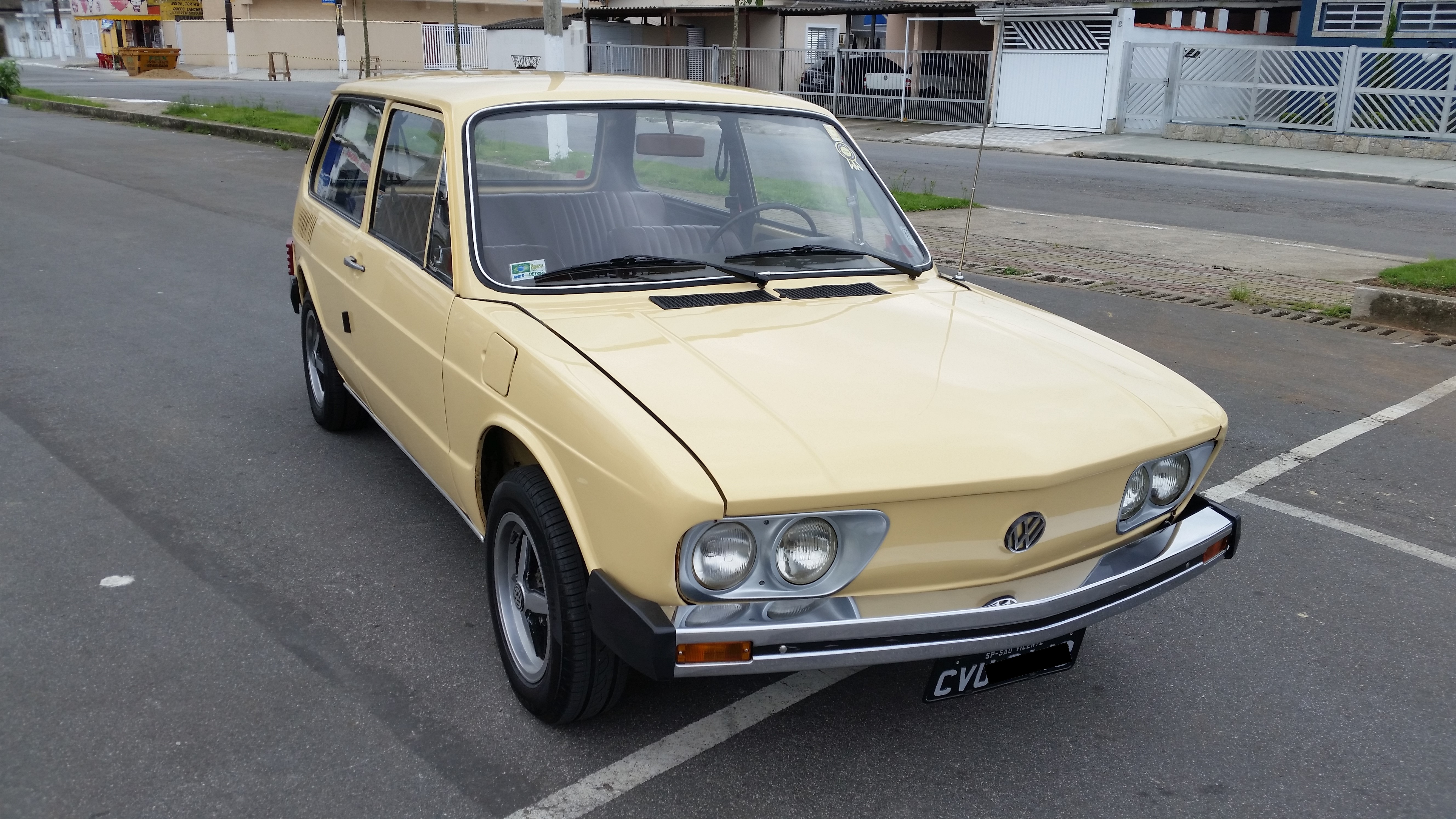 Veículo com Placa Preta, que indica que é veículo de coleção e tem preservada suas características Originais